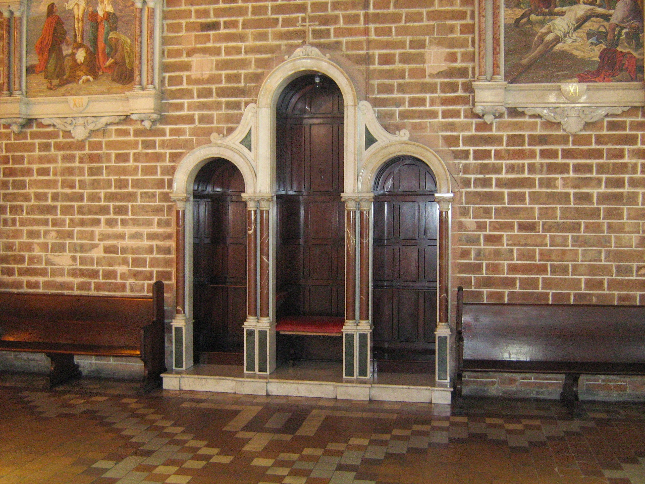 Confesionario de la Catedral Metropolitana de Medellín, Colombia